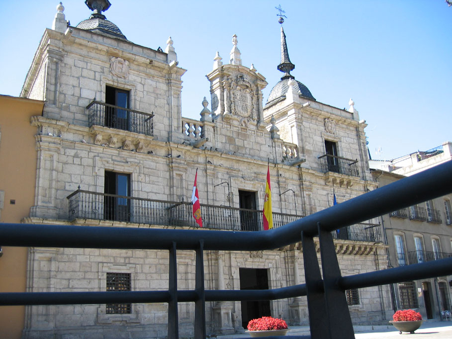 Fachada del Ayuntamiento de Ponferrada. Ponferrada, León, España. Fotografia por Alejandro Bolado